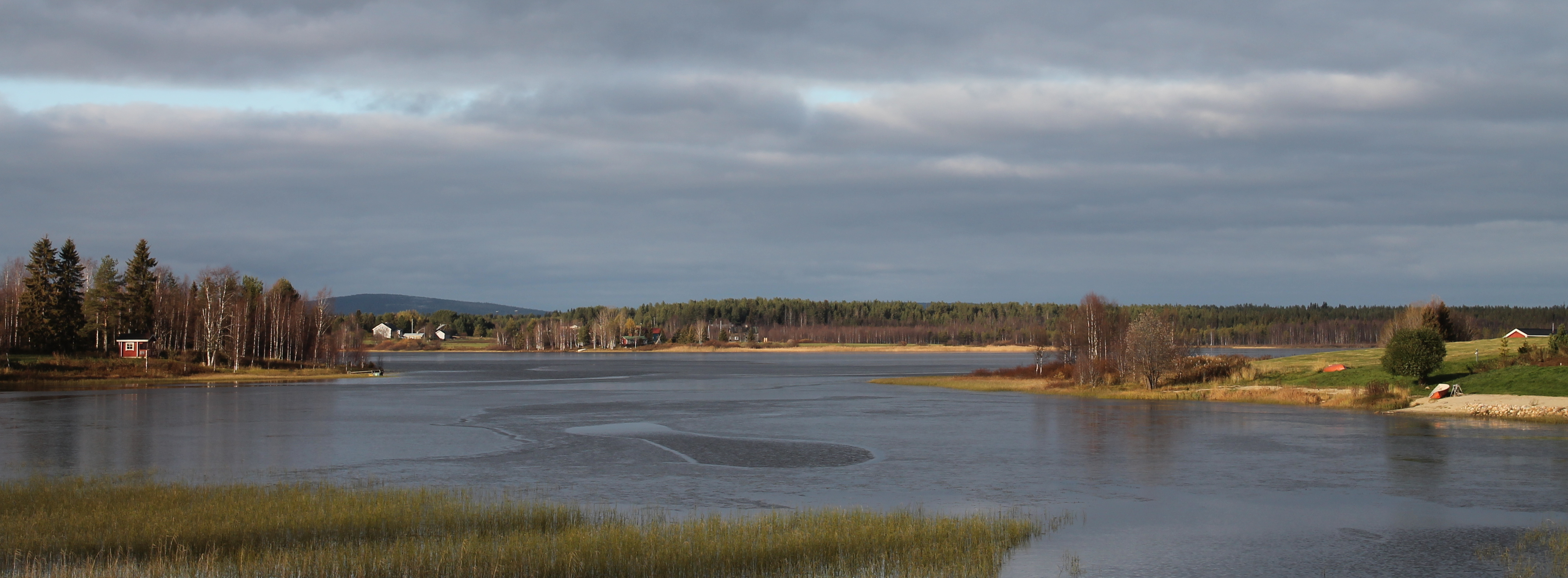 Kursun Kotijärvi